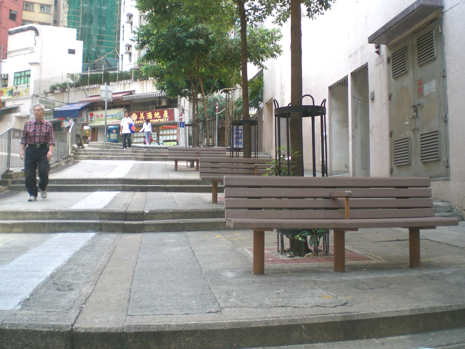 水街 Water Street, Hong Kong